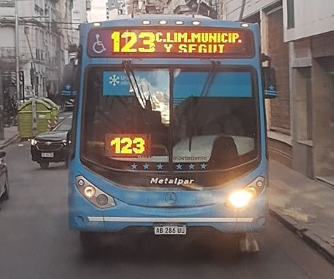 Mercedes-Benz de la línea 123, operada por la empresa Movi